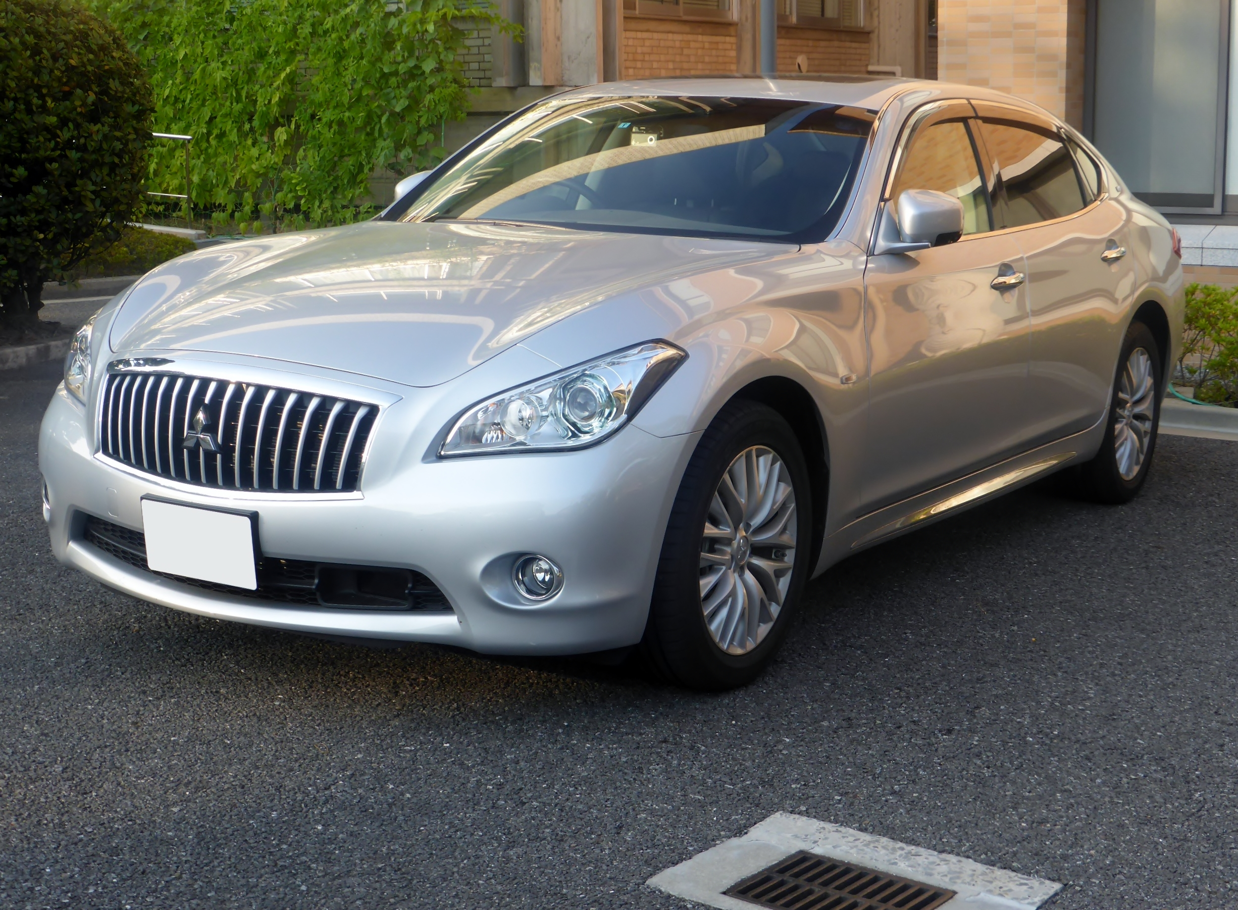 BHGY51型三菱・ディグニティVIPをフロントから撮影。